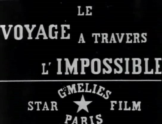 Méliès, Le voyage a travers l'impossible1904 colorizée 01